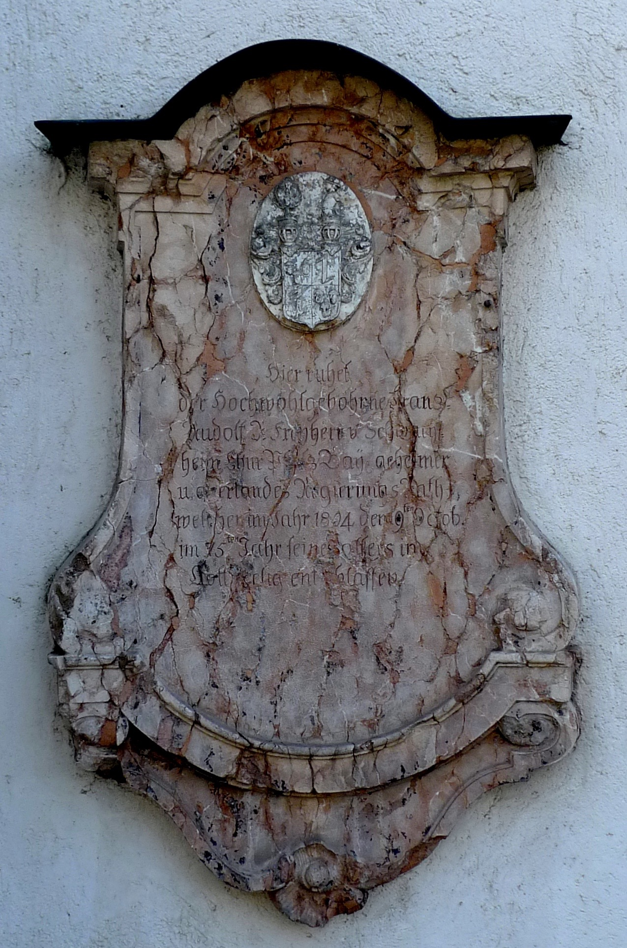 Franz Rudolf Freiherr von Schwachheim (1731–1804), Epitaph an der Mauer der Kirche München-Haidhausen